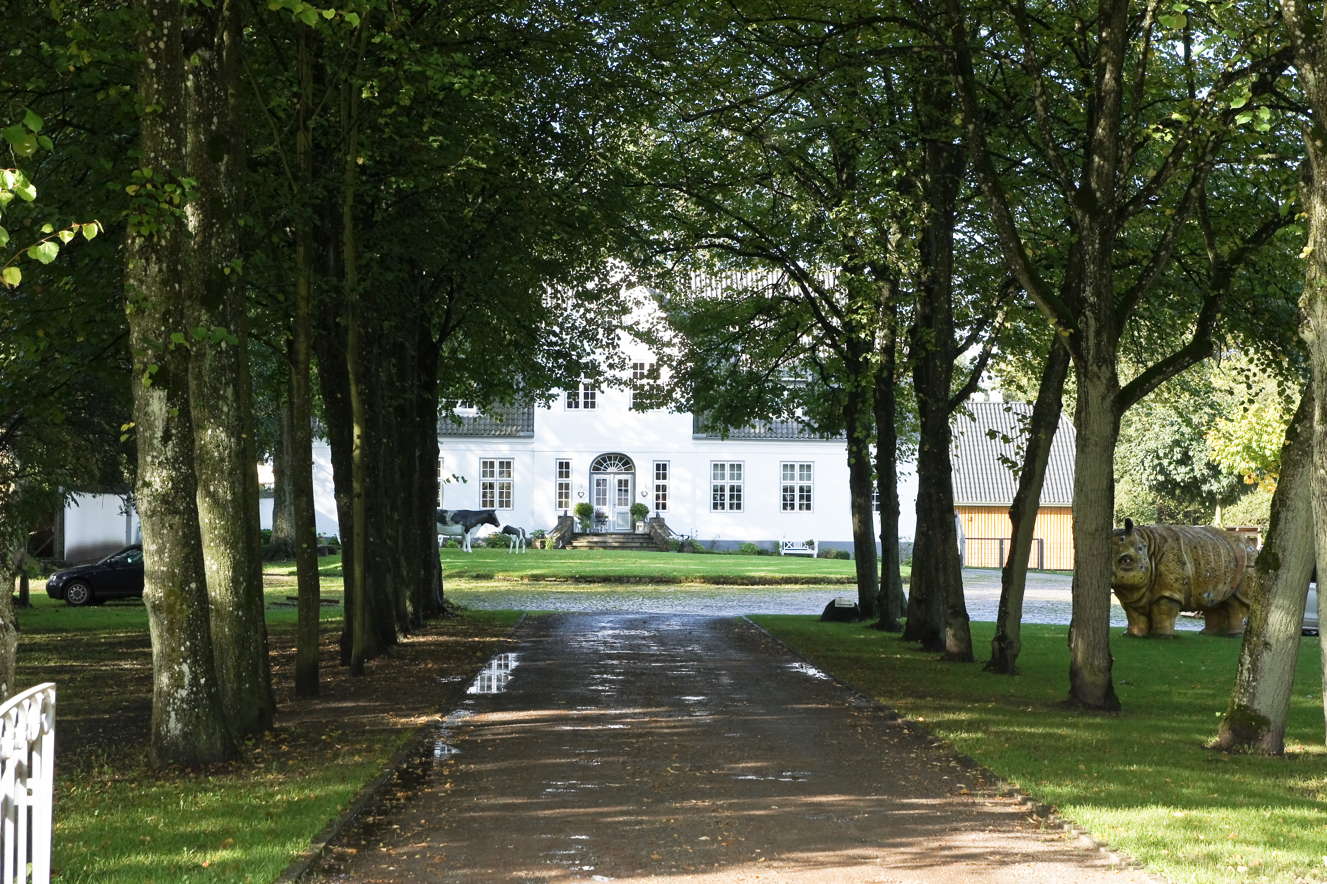 Flensburg-Sandberg, Sünderup Hof 1, Denkmal Nr.: 7.1, Eigentlich im Stadtteil Sünderup gelegener Gutshof. Privatgelände